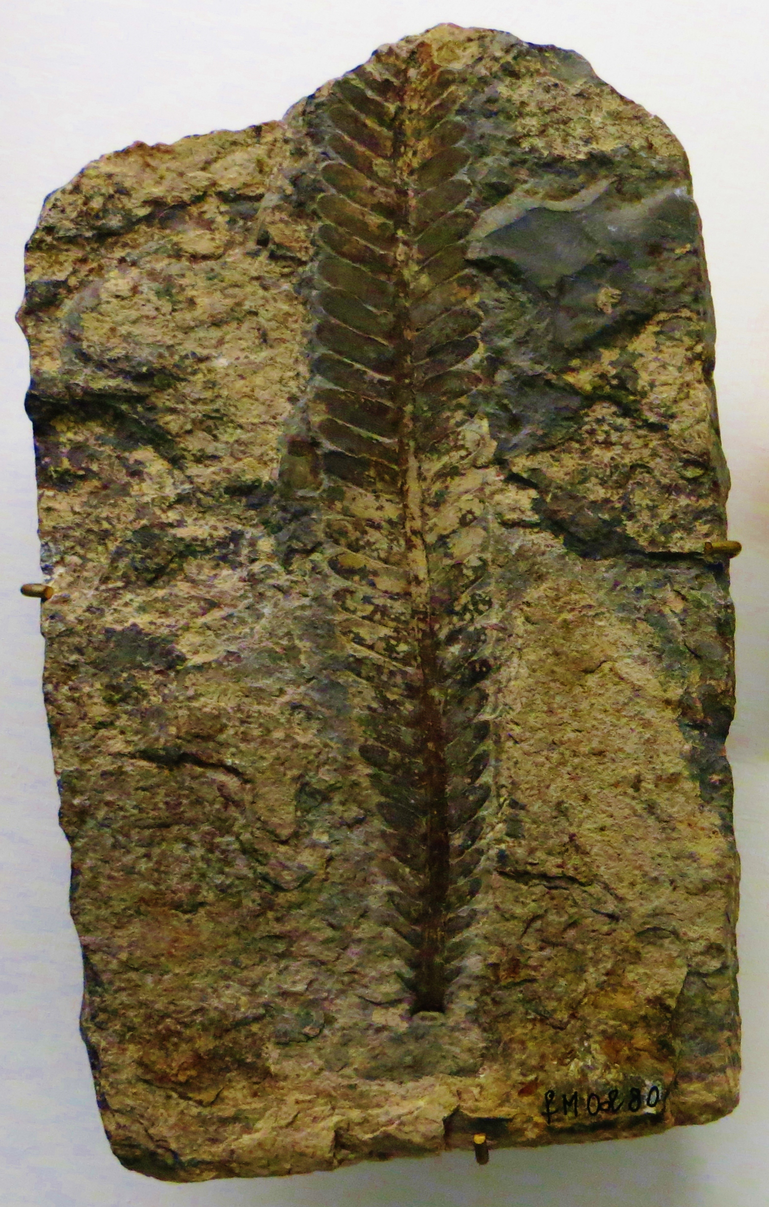 Fossil of Ptilophyllum, an extinct plant- Took the photo at Museo di Storia Naturale di Verona